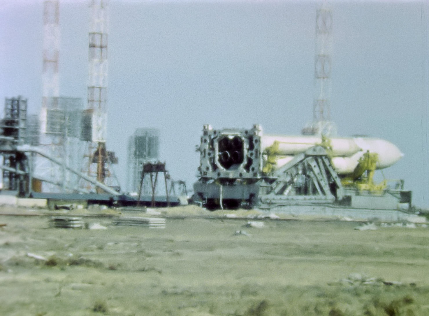 Транспортёр вывозит ракету-носитель «Энергия» на стартовый комплекс. Кадр из кинофильма собственной съёмки.